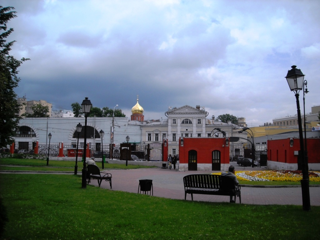 Hermitage Gardens near Петровский бульвар